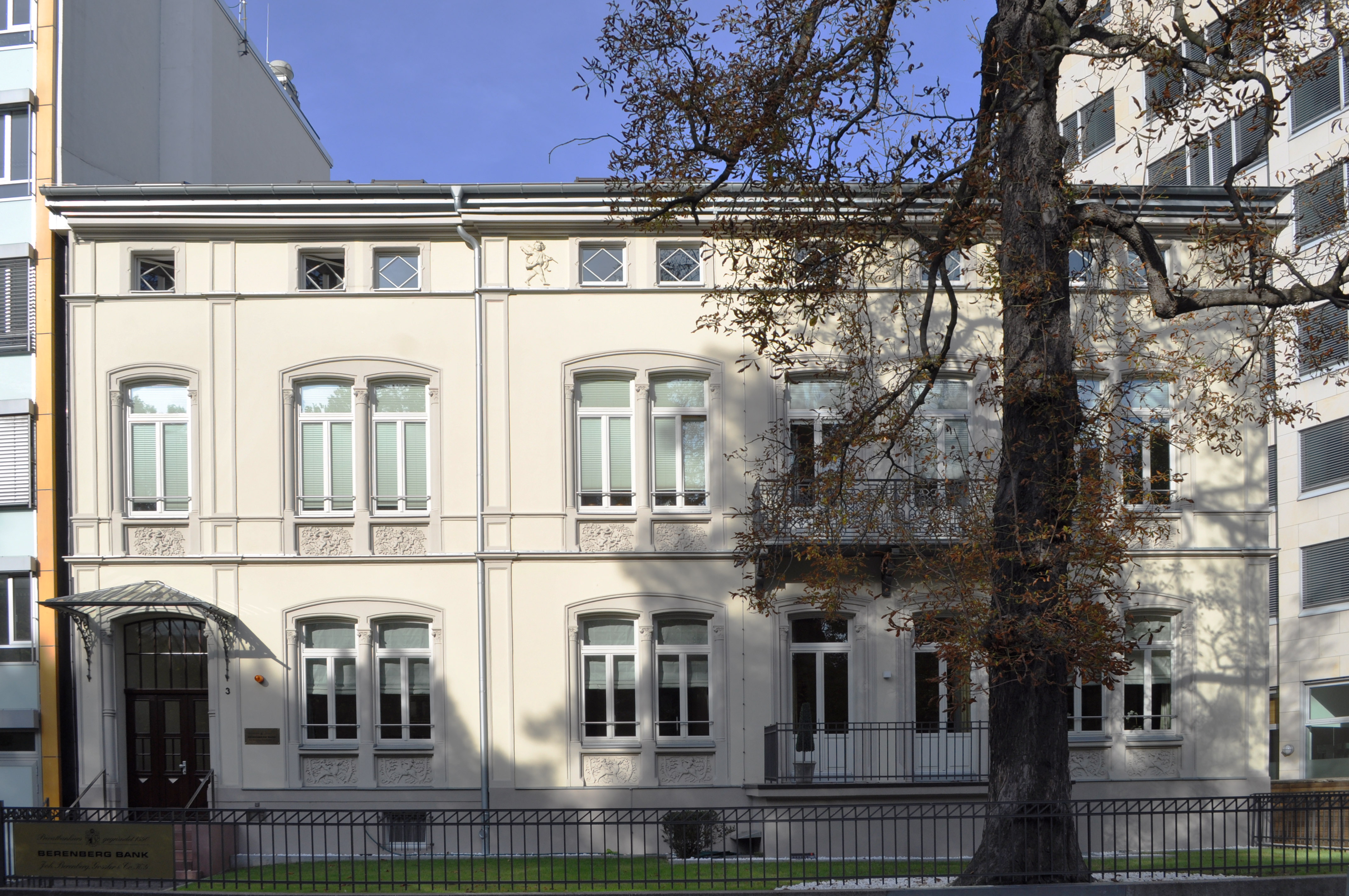 Schwindhaus in Frankfurt